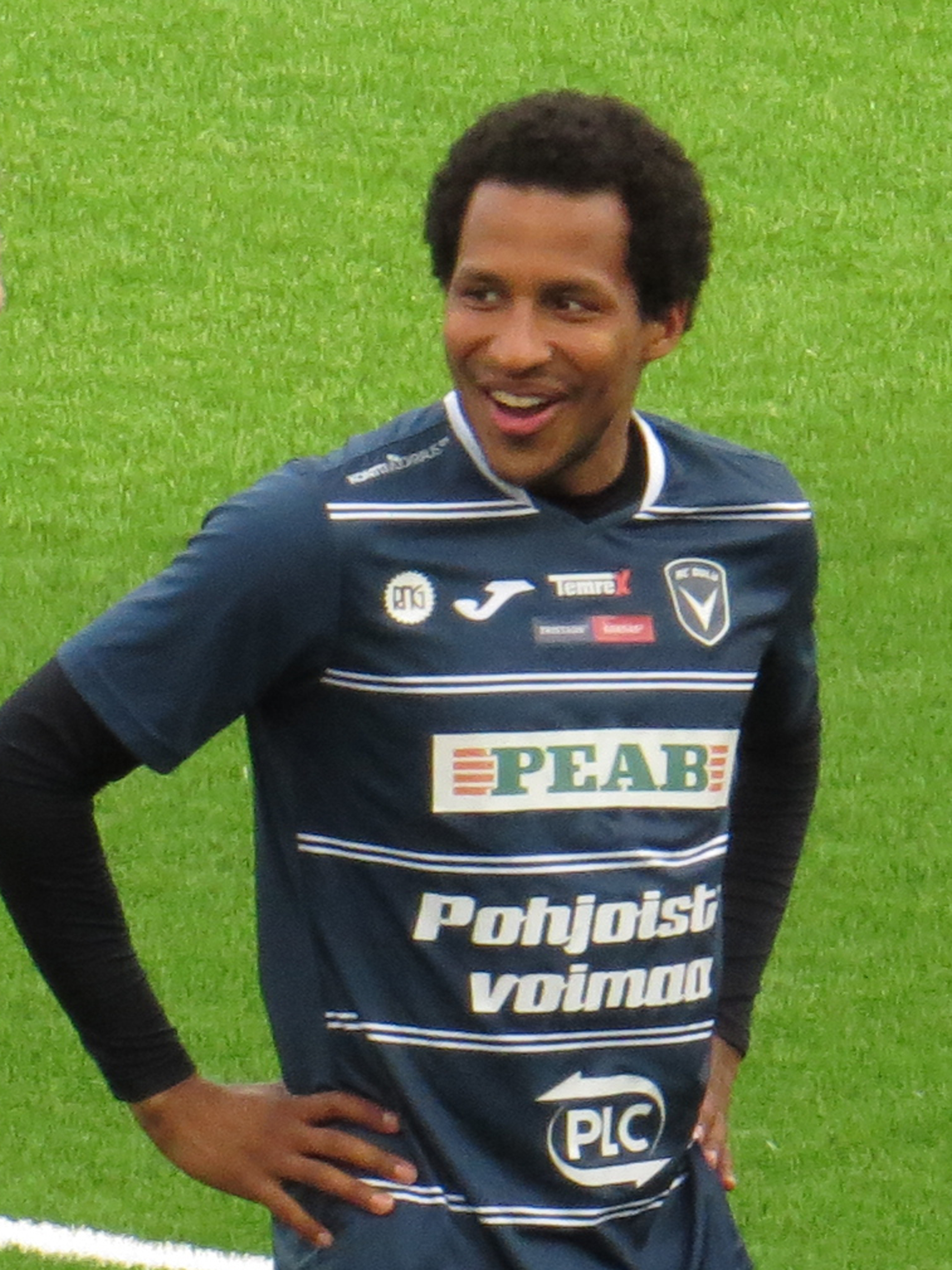 David Ramadingaye, tšadilaistaustainen suomalainen jalkapalloilija AC Oulun joukkueessa kaudella 2016.